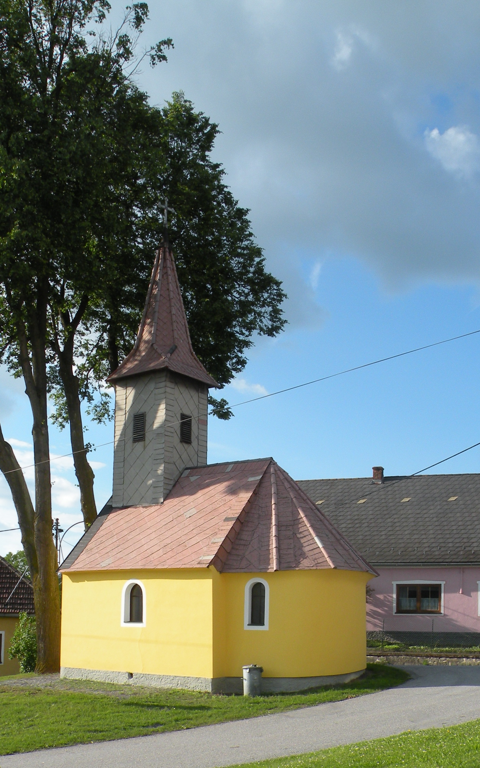 Ortskapelle Guttenbrunn